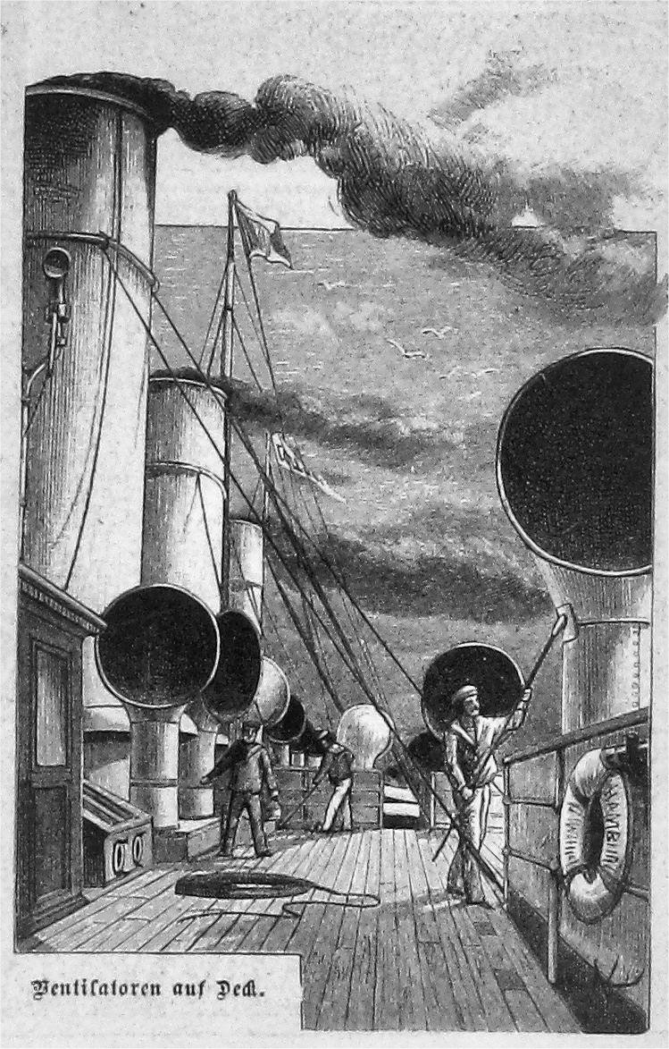 Ventilatoren an Deck des Schnelldampfers "Columbia"